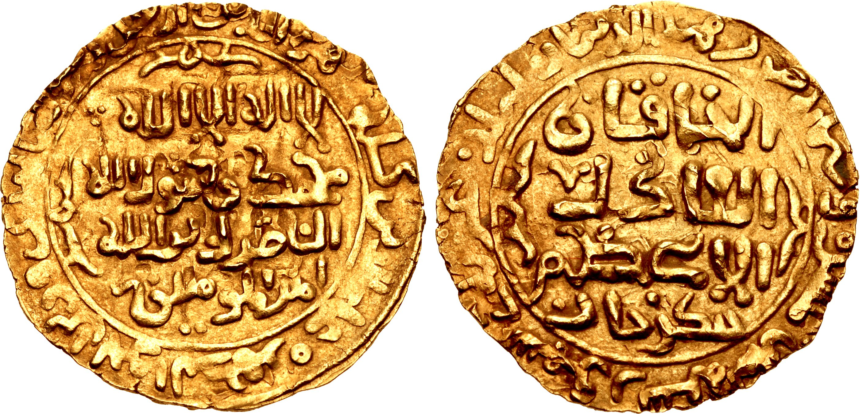 سکه دینار چنگیز خان که به سبک حکام اموی و عباسی عبارات اسلامی بر روی آن نقر شده: لا اله الّا الله محمّد رسول الله الناصر لدین الله امیراامومنین در اطراف: محمد رسول الله ارسله بالهدی و دین الحق لیظهره علی الدین کله و در پشت آن القاب چنگیز خان به زبان عربی نقر گردیده: الخاقان العادل الاعظم ... در اطراف: سال و محل ضرب